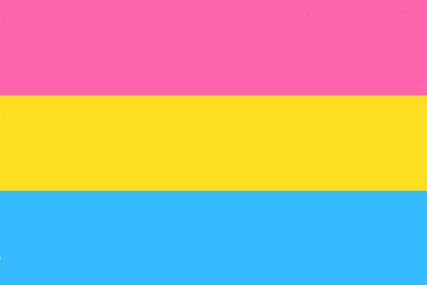 Bandeira do Orgulho Pansexual